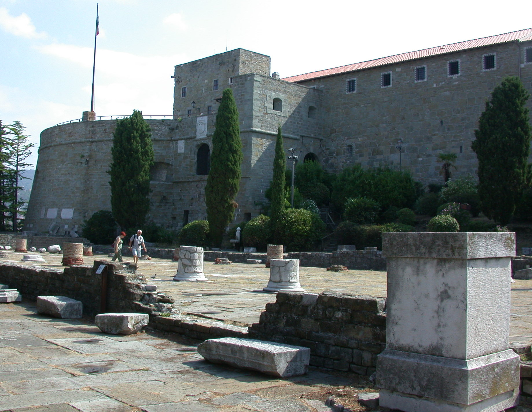 Il Castello di San Giusto a Trieste